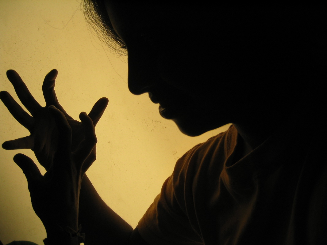 Det antikke greske begrepet pneuma harmangfoldige betydninger, blant annet «pust» og «luft».beats and breath